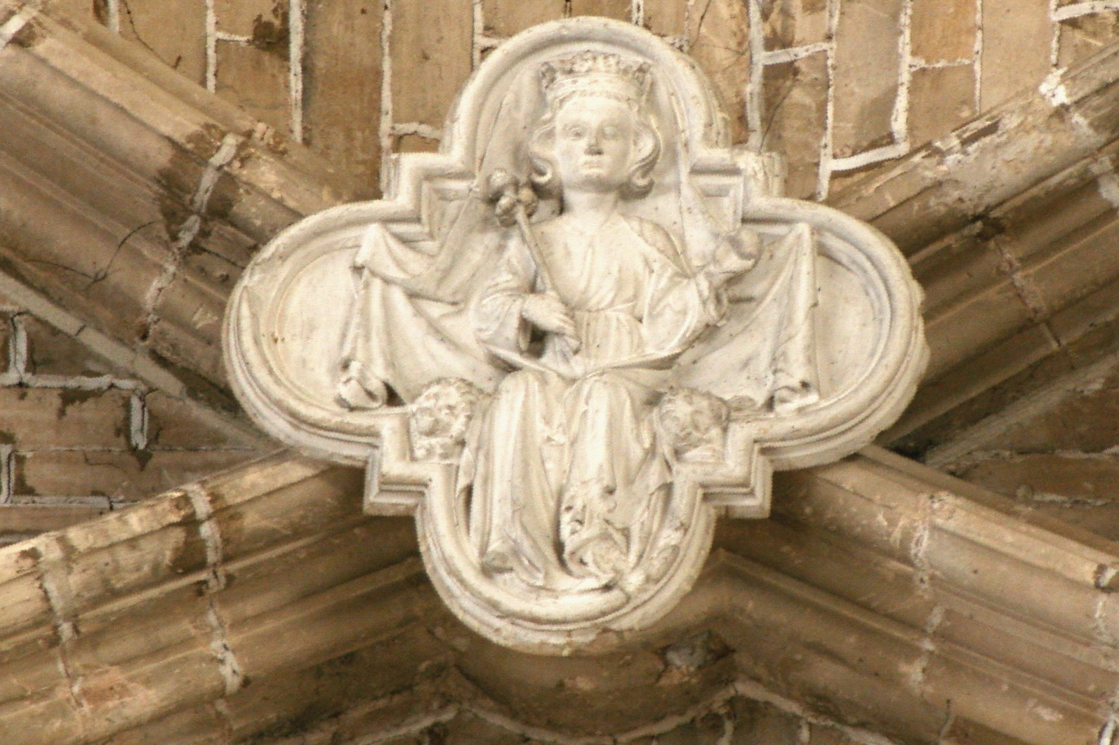 Clef de voûte de la basilique Saint-Maximin dans le département du Var en France. La reine Jeanne assise sur son trône, couronnée, le sceptre à la main.